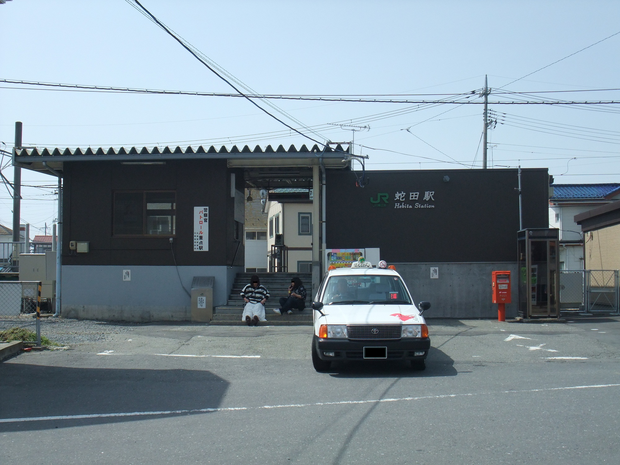 蛇田駅(新駅舎)